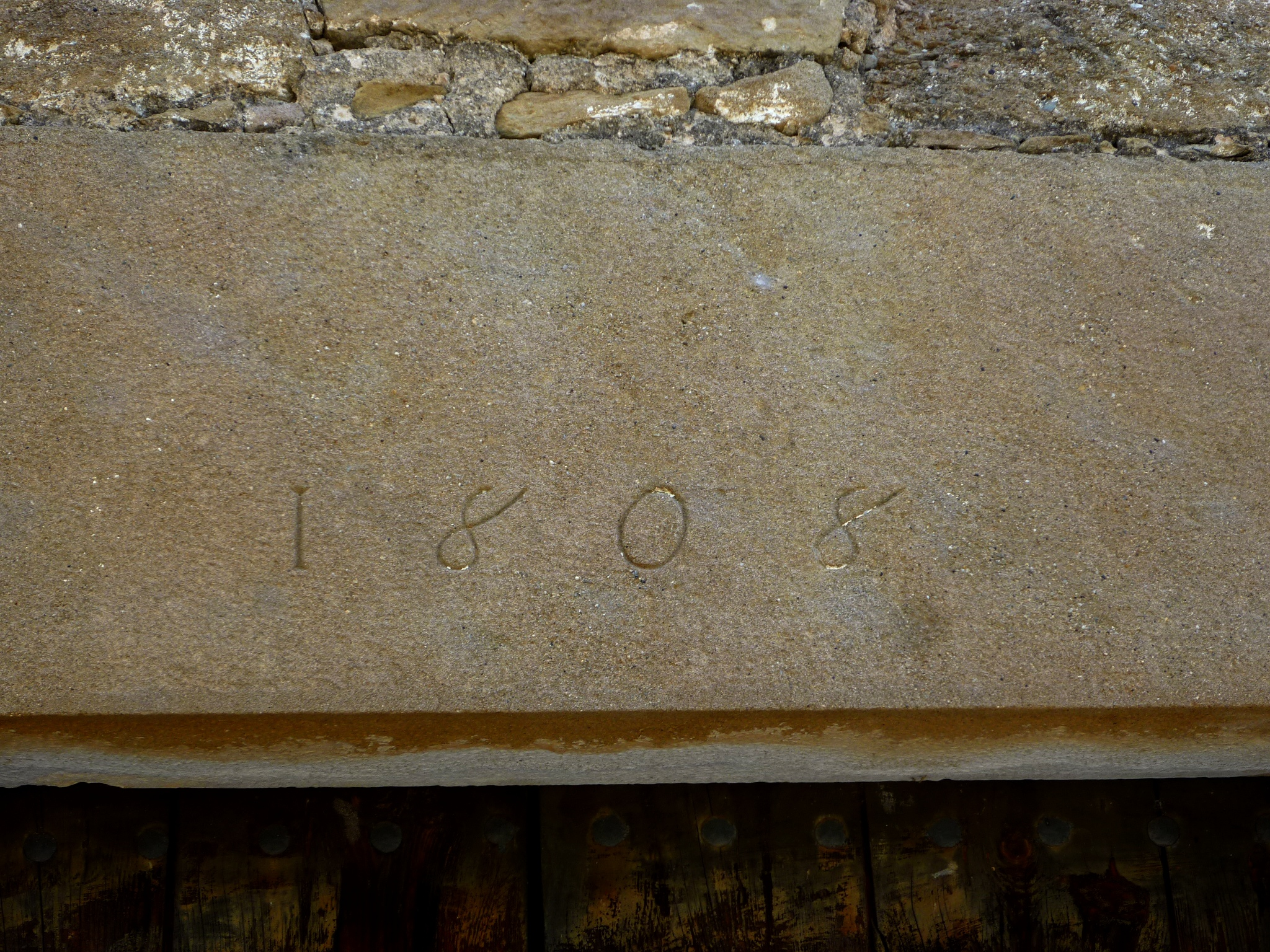 Ermita dels Apòstols (Castellar de la Ribera): llinda del portal